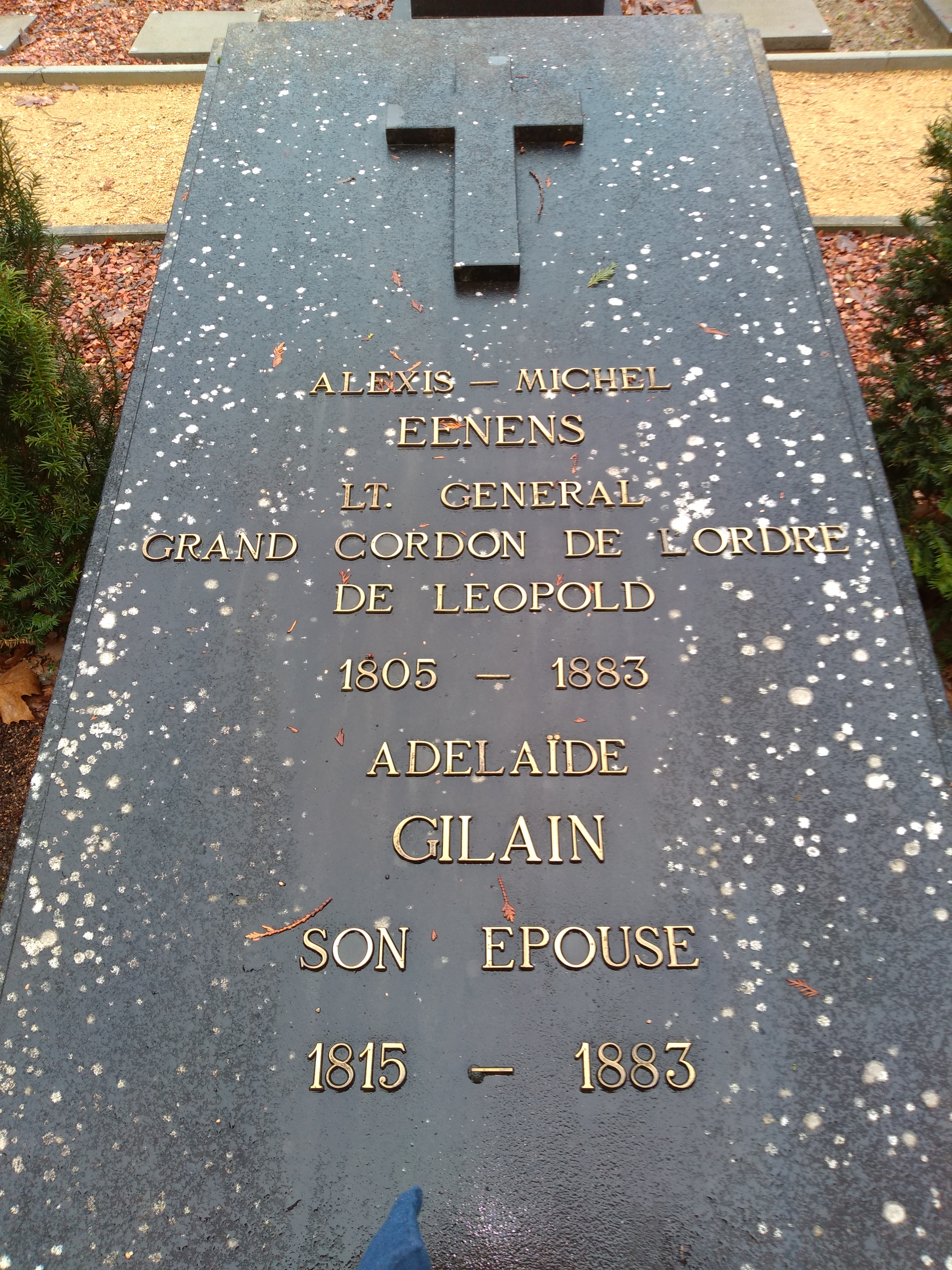 Tombe du Général Eenens et de son épouse, Adélaïde Gilain, cimetière de Schiplaeken (Boortmeerbeek)